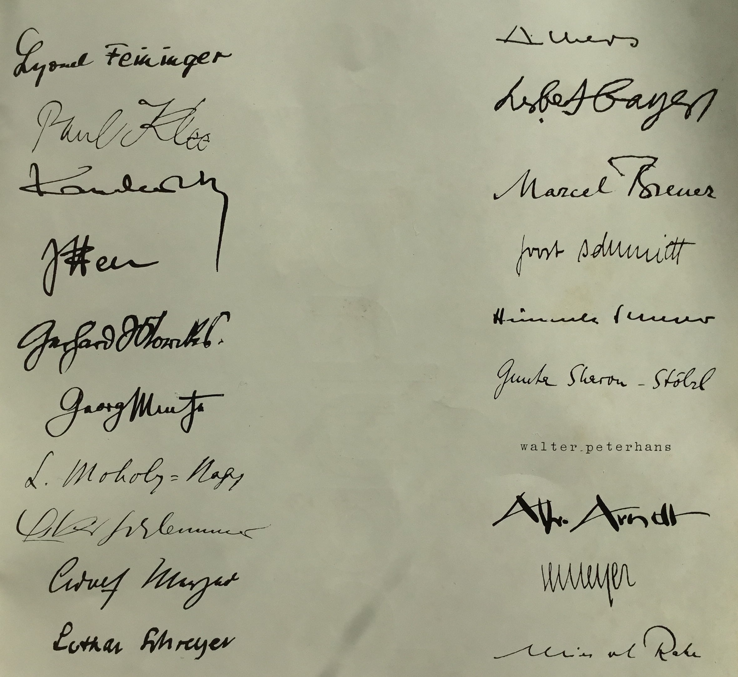 Signaturen der BAUHAUS - Künstler / Künstlerinnen